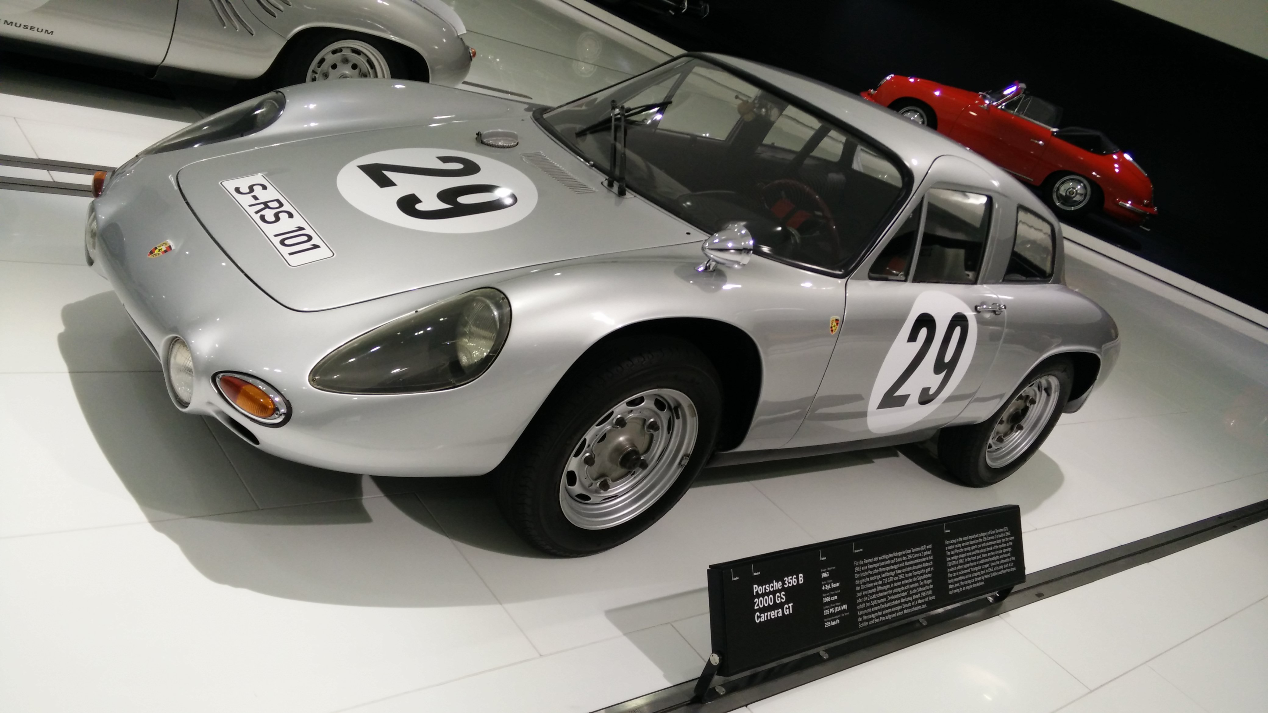 IMG_20141112_112829